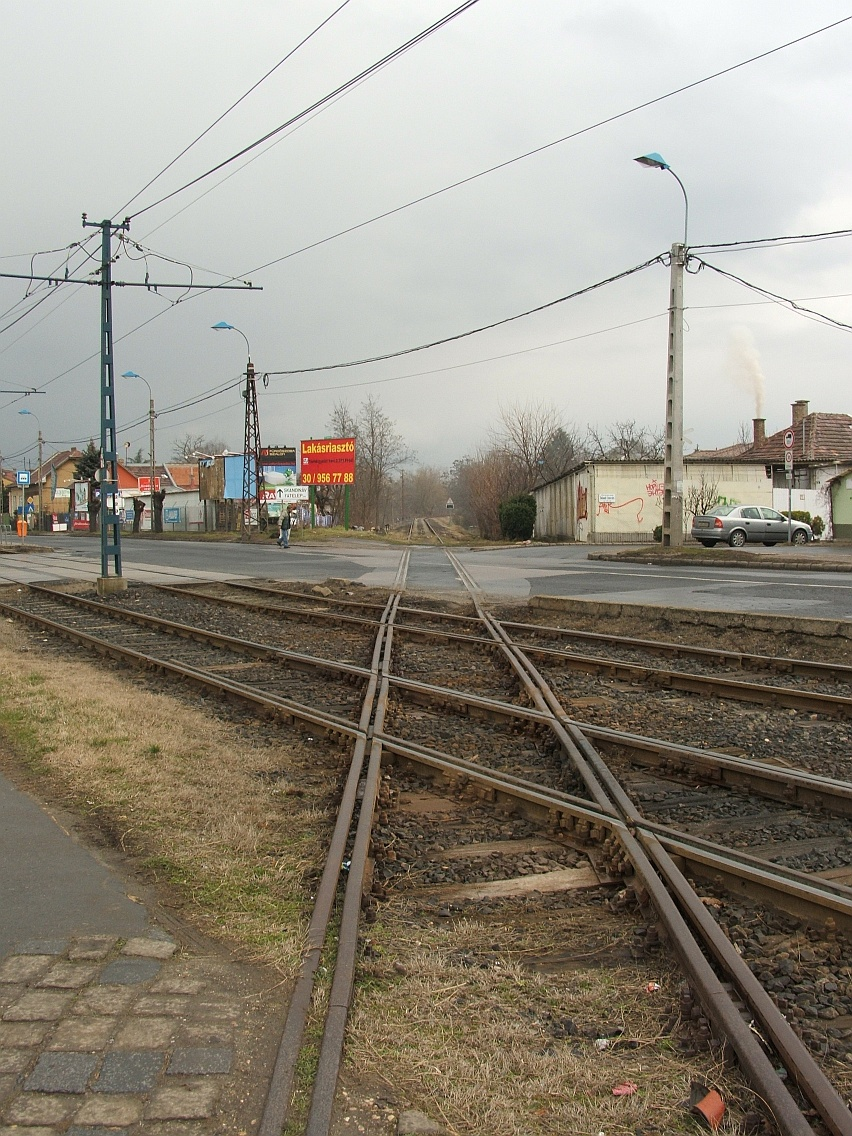 A Burma-vasút keresztezi az 50-es villamos vonalát az Üllői út mellett (Budapest)